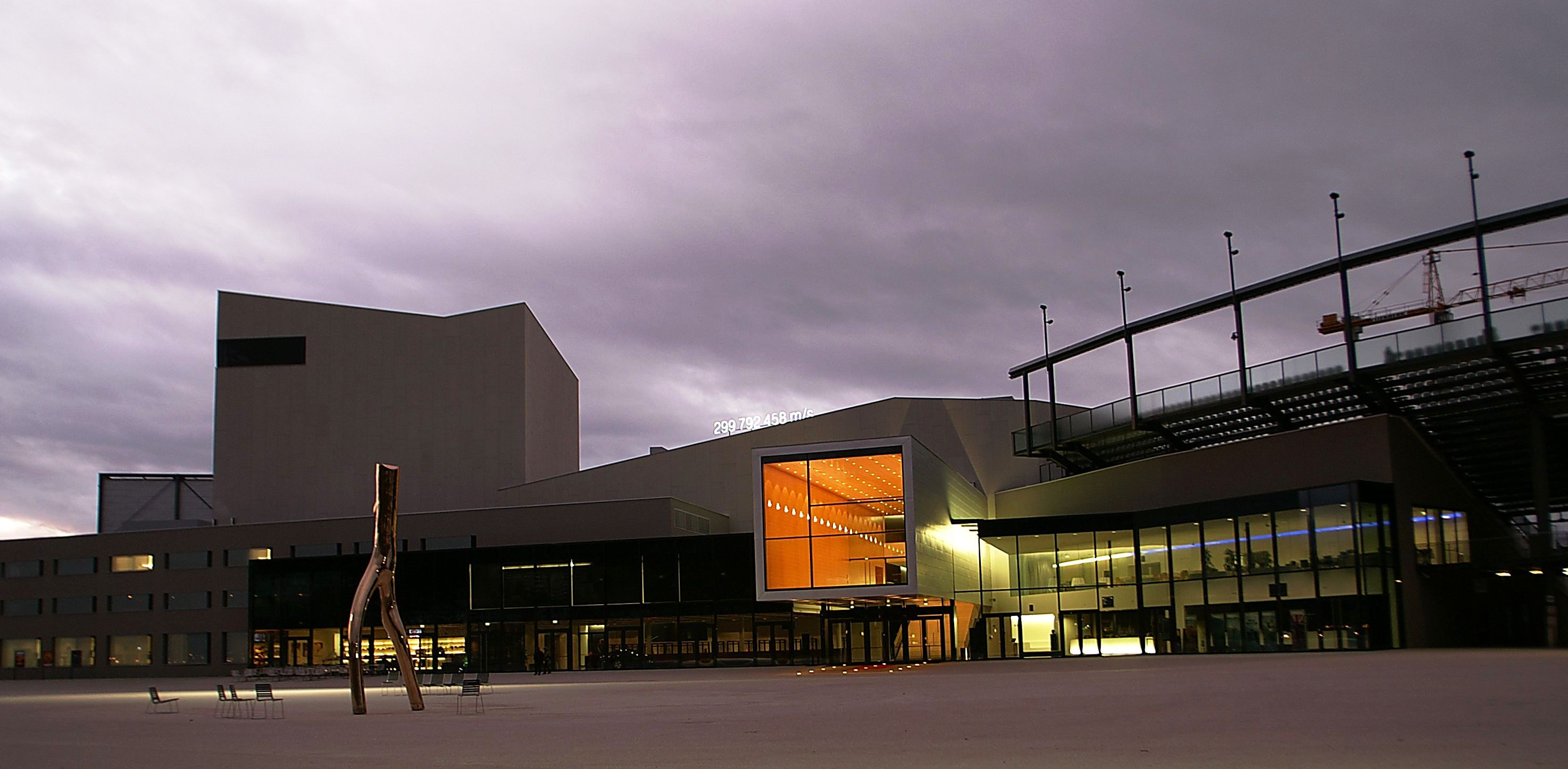 Das Festspielhaus in Bregenz am Bodensee.